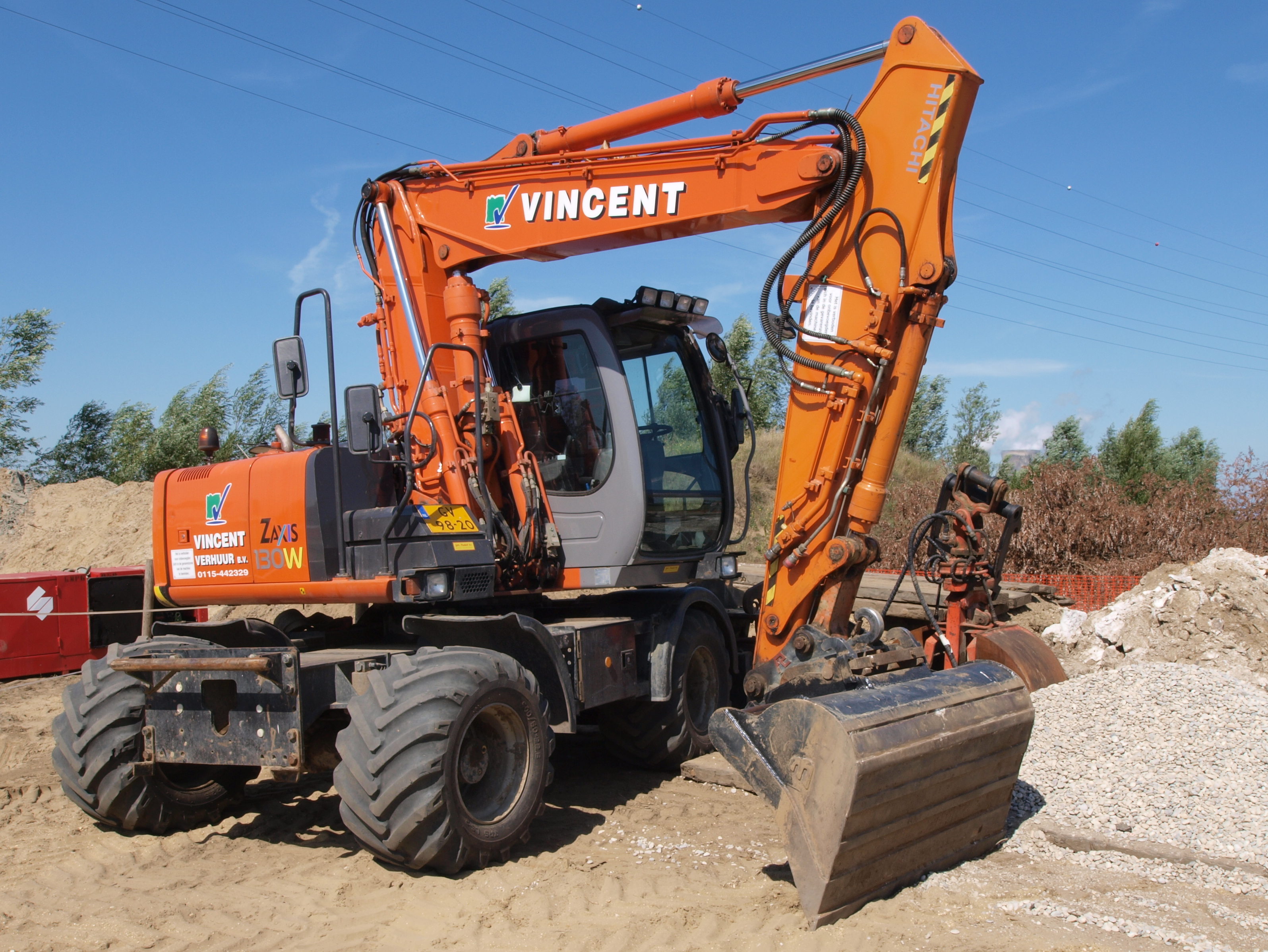 Hitachi Zaxis 130W